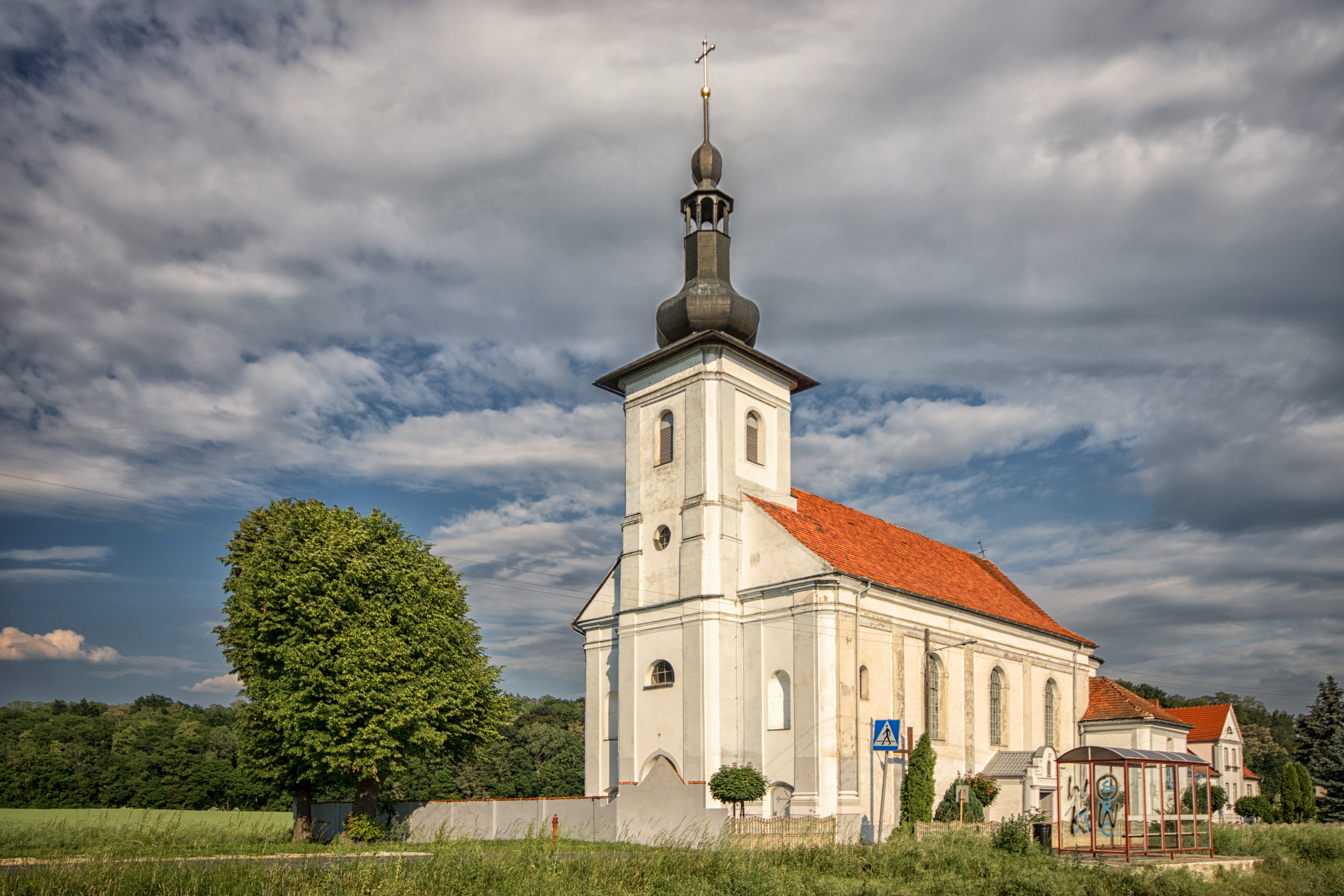 Dzielów - rzymskokatolicki kościół parafialny pw. św. Mikołaja, pocz. XVIII, XIX w.